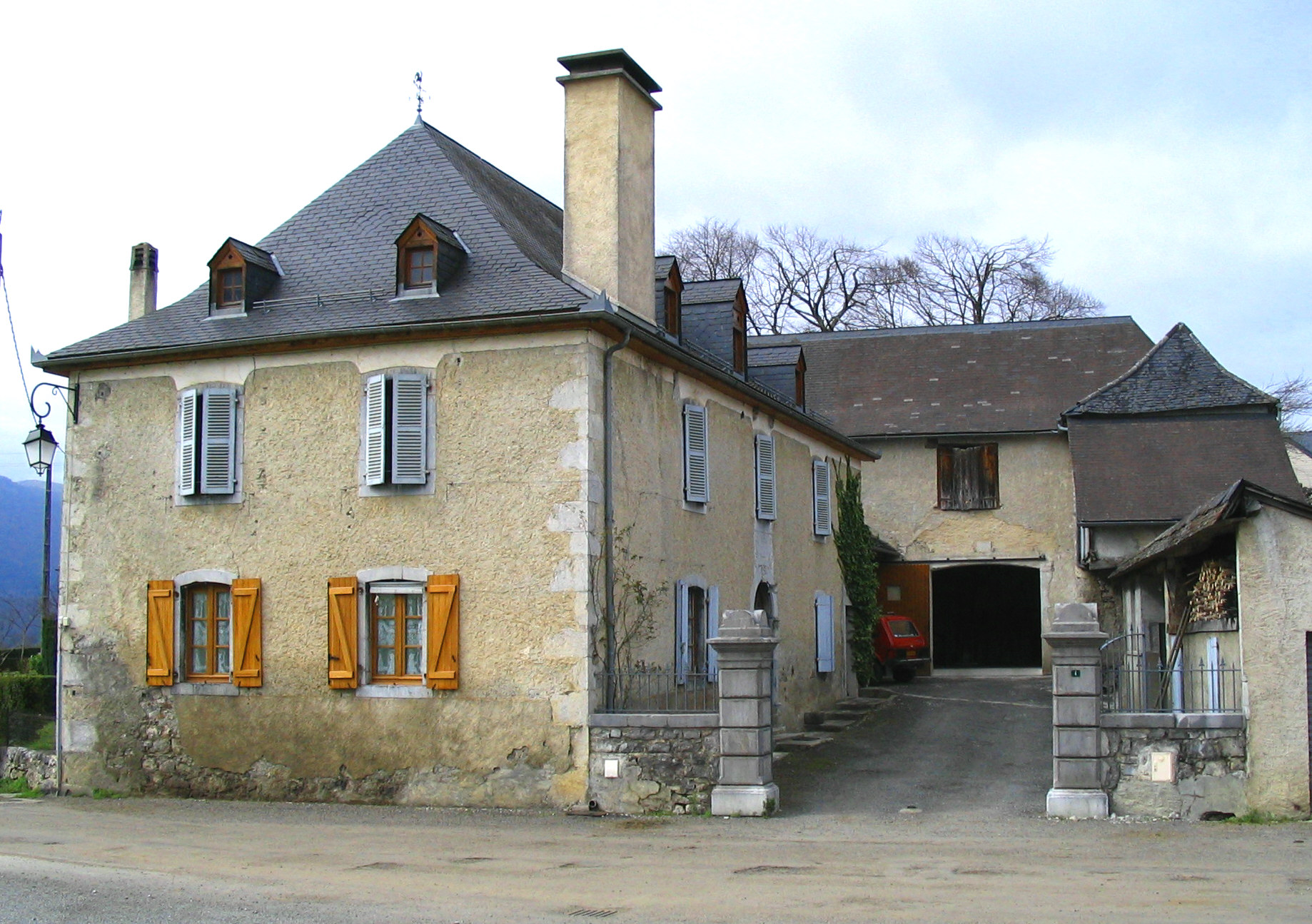 Maison à Sainte-Colome, pyrénées atlantiques, France